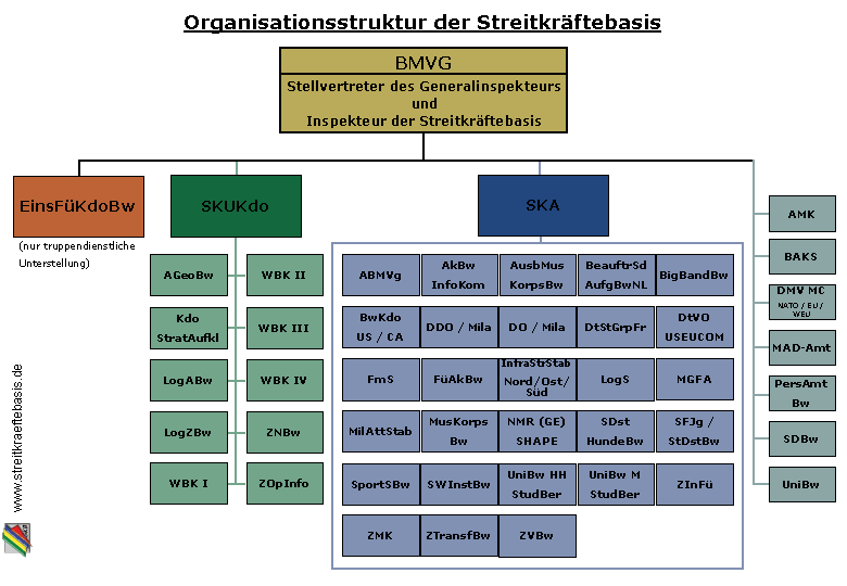 Organigramm der Streitkräftebasis